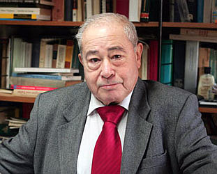 Fotografía de D. Dalmacio Negro Pavón